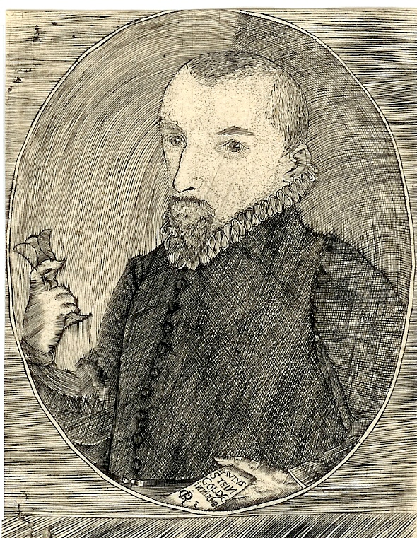 Portrait des nürnberger Goldschmieds Paulus Stein von J.C. Renner